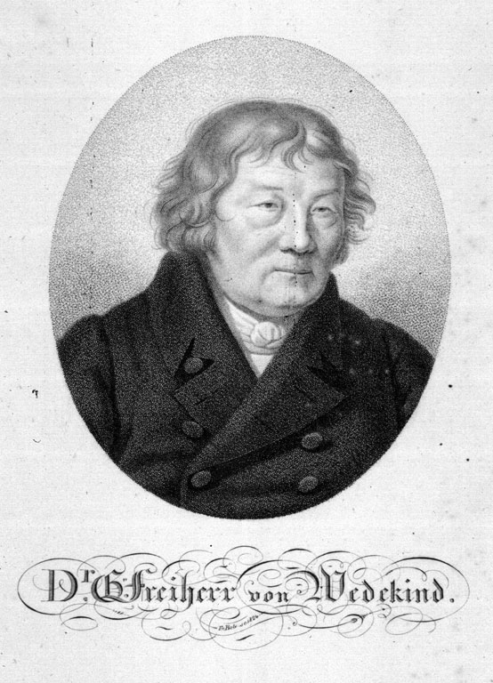 Der Arzt und Revolutionär Georg Christian Gottlieb Freiherr von Wedekind (1761–1831)